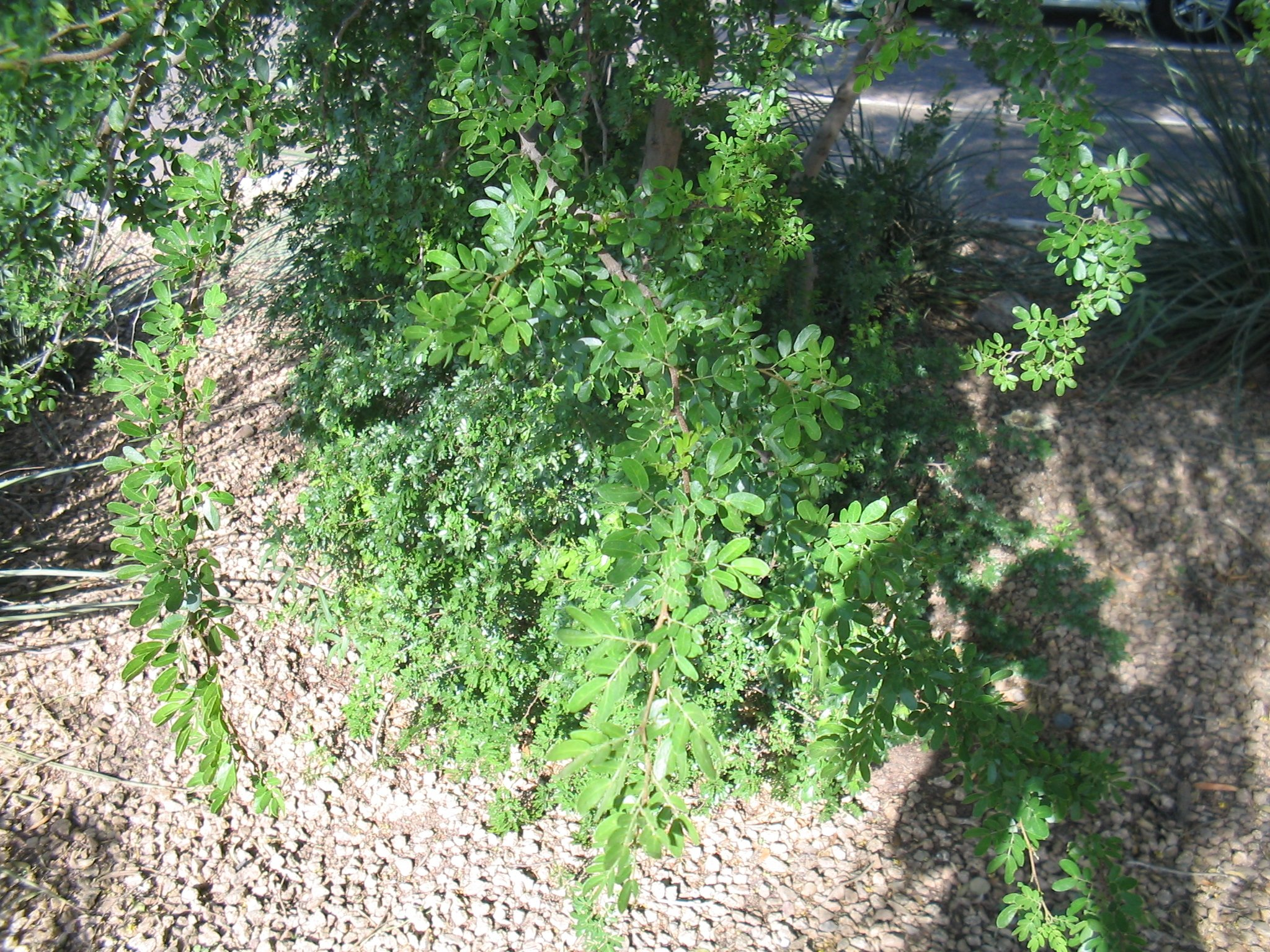 Acacia rigidula foliage